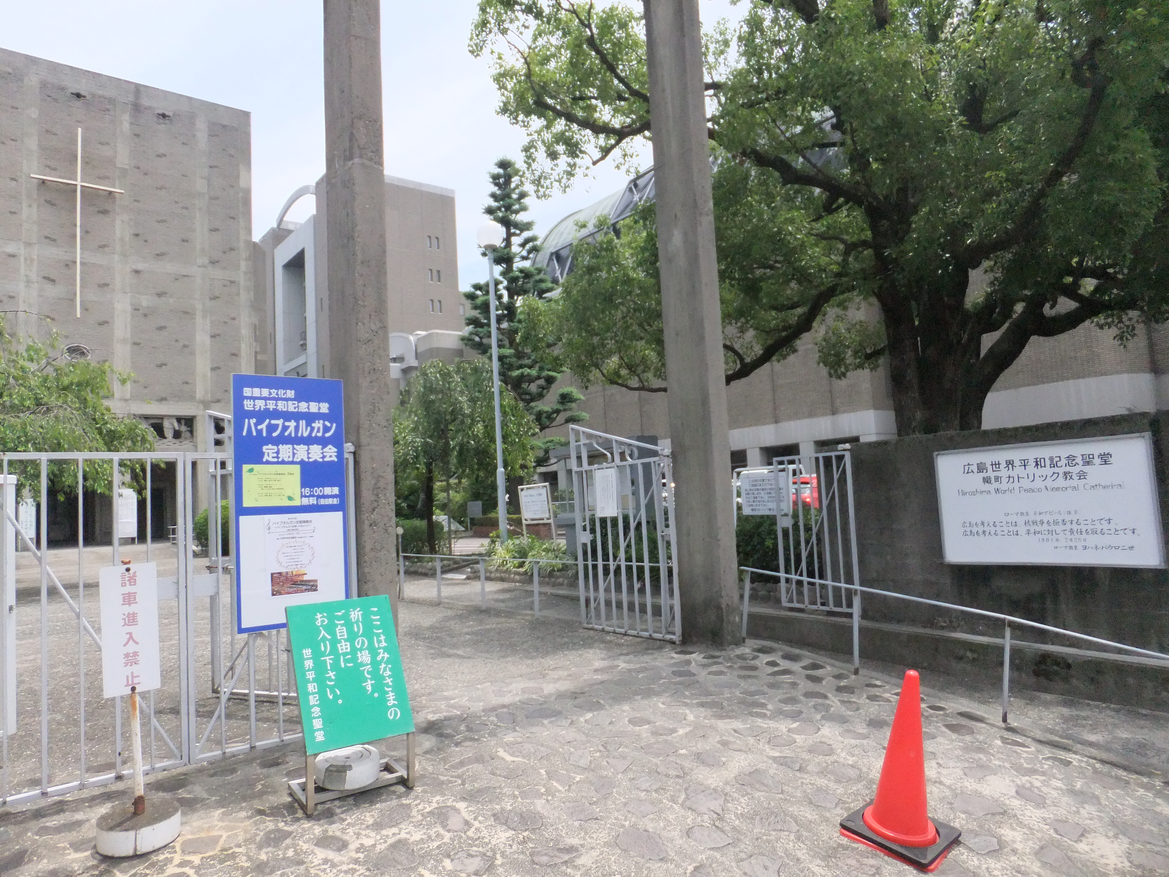 世界平和記念聖堂